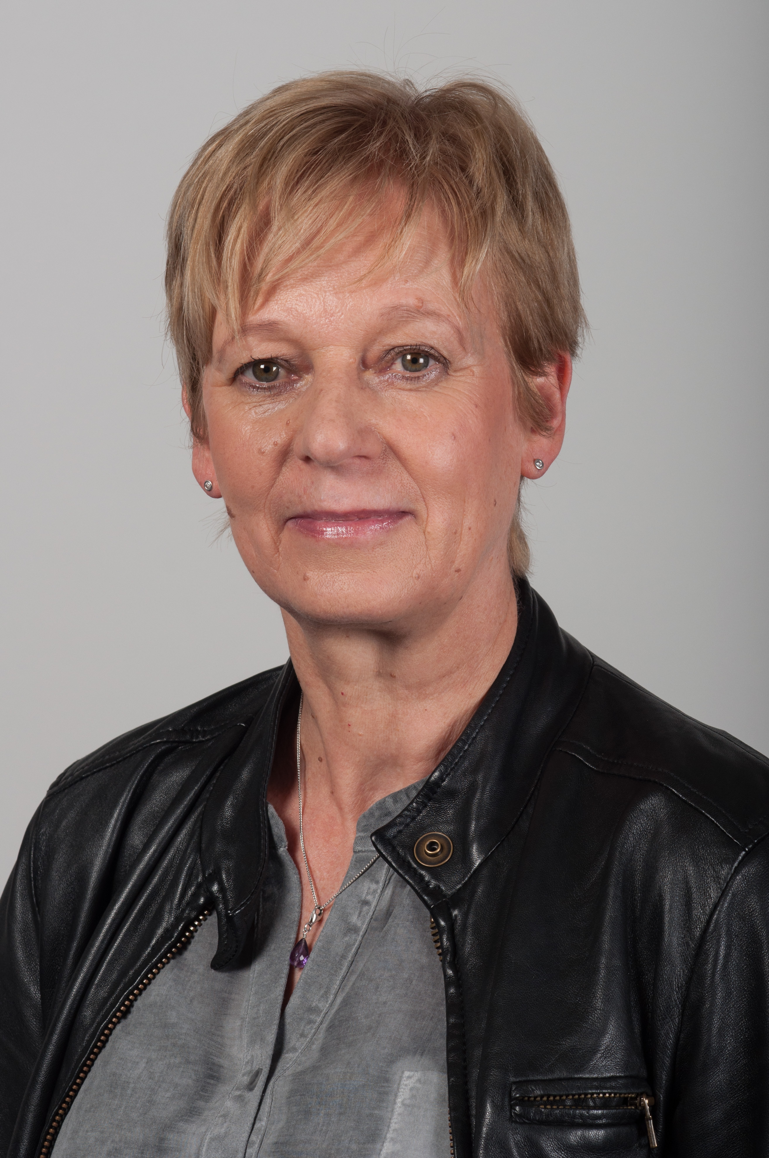 Maria Klein-Schmeink (Bündnis 90/Die Grünen), MdB